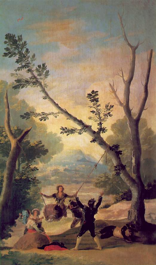 El columpio. Madrid, colección particular.